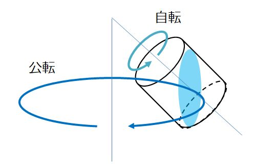 自転と公転の容器の動きを示す